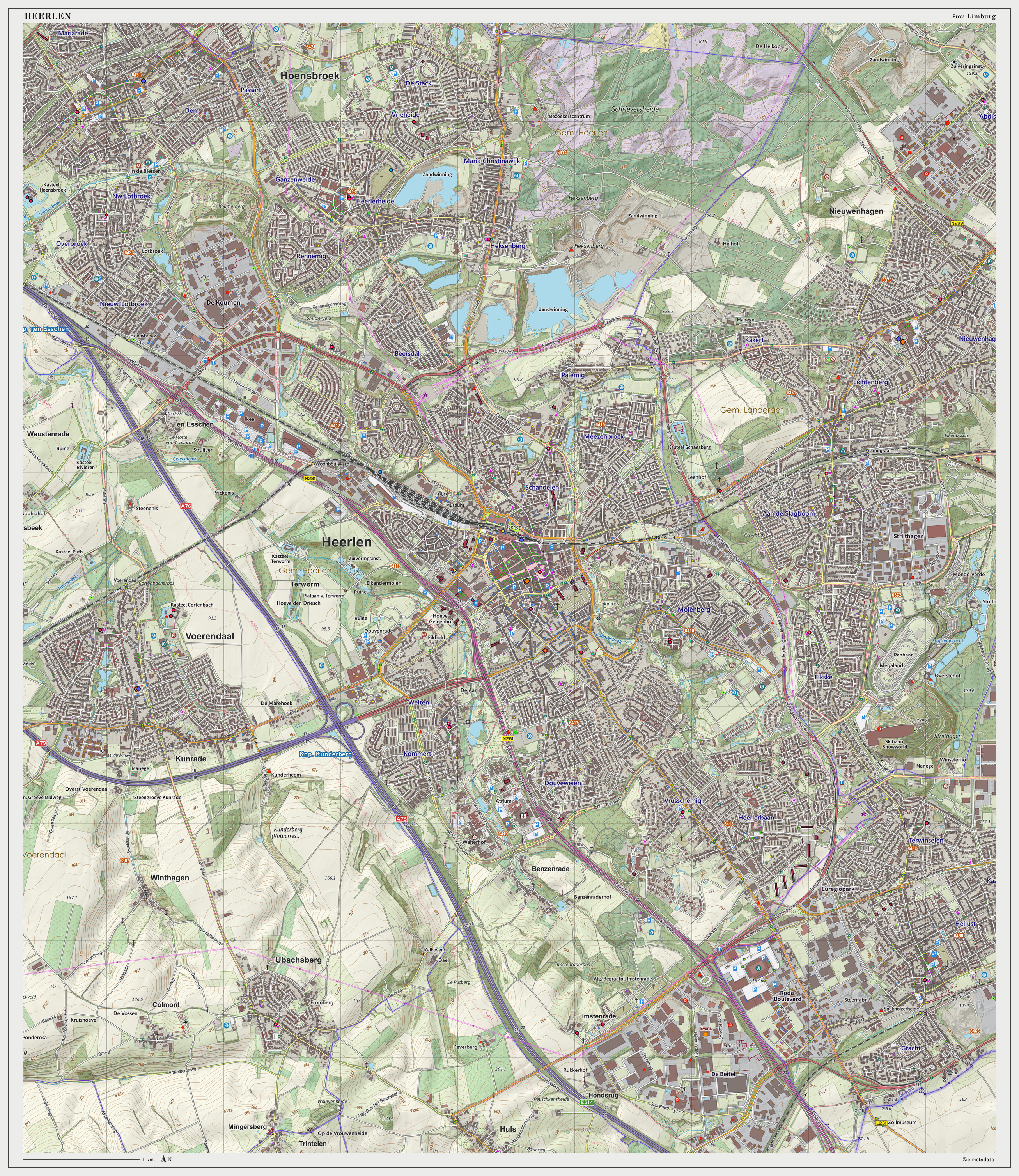 Topografische kaart van Heerlen (woonplaats). Resolutie: 300 pixels/km. Kaartbeeld samengesteld uit de open geodata van de Top10NL en Top25namen (Basisregistratie Topografie, Kadaster), Creative Commons BY licentie. Gebouwvlakken uit open geodata BAG extract. Wegen uit de OpenStreetMap, OpenStreetMap community. Reliëfschaduw uit de Actuele Hoogtekaart AHN2. Samenstelling en kleurenschema: Jan-Willem van Aalst, met QGIS2. Zie ook de Legenda.